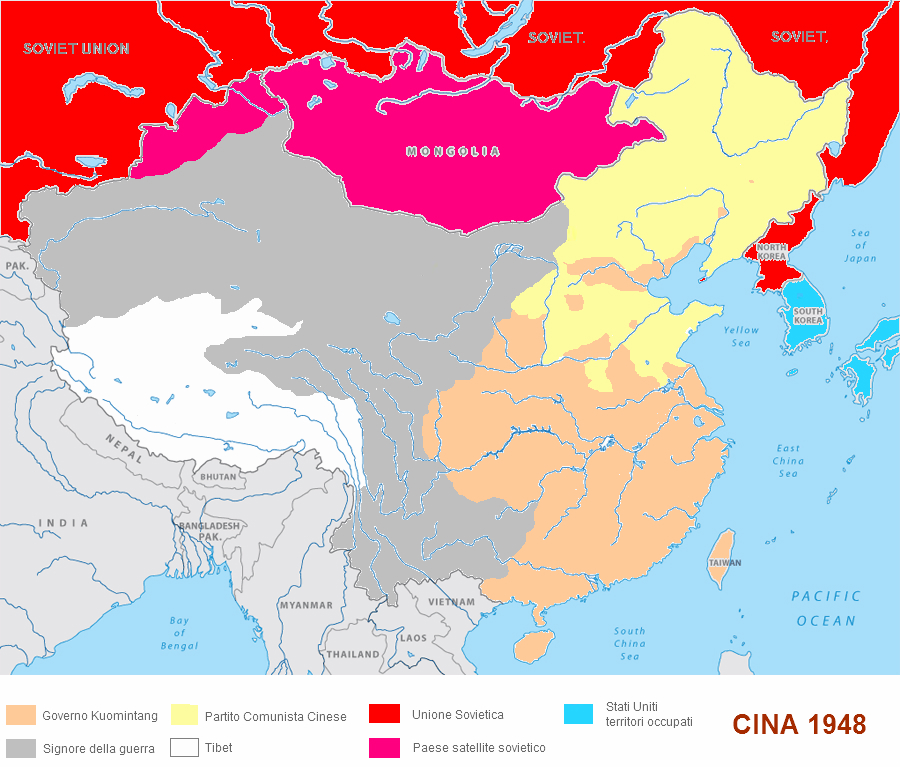 La Cina nel 1948 durante la guerra civile, In yiallo comunisti cinesi, in rosso occupazione sovietica, in arancio Kuomintang, in yriyio anarchia